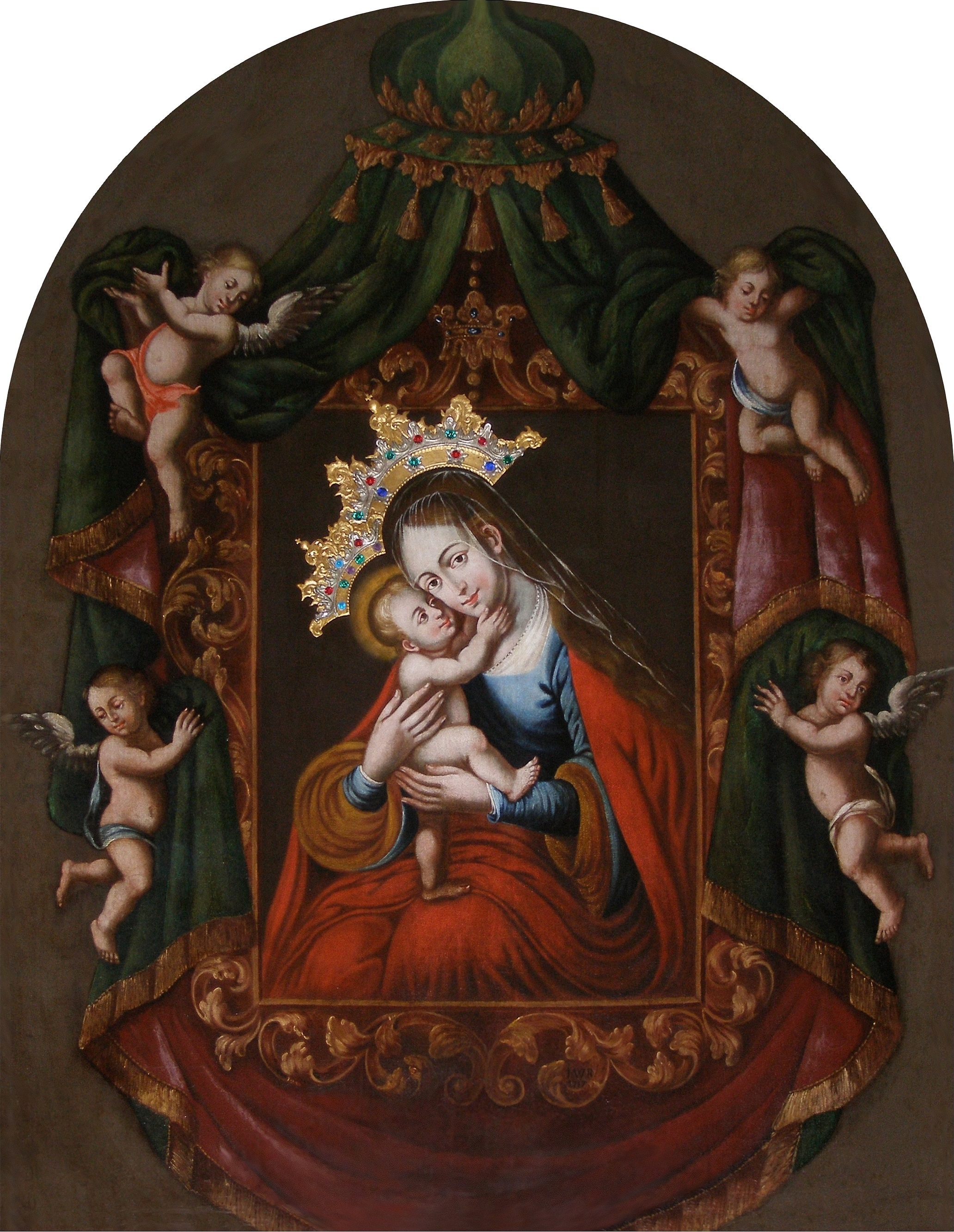 Dobrotivý obraz Panny Marie Pomocné ze Skoků (dříve Skok, něm. Stock), označovaný dříve též jako "pasovský obrázek" a později v českém lidovém prostředí i jako "panenka skákavá" - z původního označení obrazu "Panny Marie ve Skoku". Obraz namaloval v roce 1717, na objednávku zakladatele skocké kaple Adama Lienerta, toužimský malíř Johann Wolfgang Richter. Práce mu trvala 8 dnů a dostal za ní zaplaceno 9 zlatých. Předlohou obrazu byl oltář se zázračným milostným obrazem Panny Marie Pomocné z německého Pasova. Skocký obraz měl původně asi obdélný formát, později, po přenesení do nově zbudovaného kostela v roce 1740 bylo patrně plátno upraveno do dnešní podoby a obraz byl opatřen plechovou pozlacenou korunkou posázenou umělými kameny. V roce 1733 byl skocký obraz P. Marie Pomocné z Pasova římskokatolickou církví uznán za obraz dobrý a dobrotivý, ale vždy byl považován za obraz milostný. Obraz byl instalován ve speciálním zaoltářním prospektu, na závěsech, které umožňovaly jeho posouvání během poutních mší z dřevěného rámu na přední stěně prospektu na stěnu zadní, kde byl přístupný poutníkům. K tomu účelu byl prospekt vybaven dvouramenným schodištěm mezi stěnami, pro snažší přístup k obrazu se pod ním na stěně nacházelo madlo a pod ním pak schůdky, které současně sloužily i jako klekátko a oltářní pokladna - schránka na peněžní obětiny. Dnes je vzácný obraz ochraňován v konventní kapli kláštera premonstrátů v Teplé.